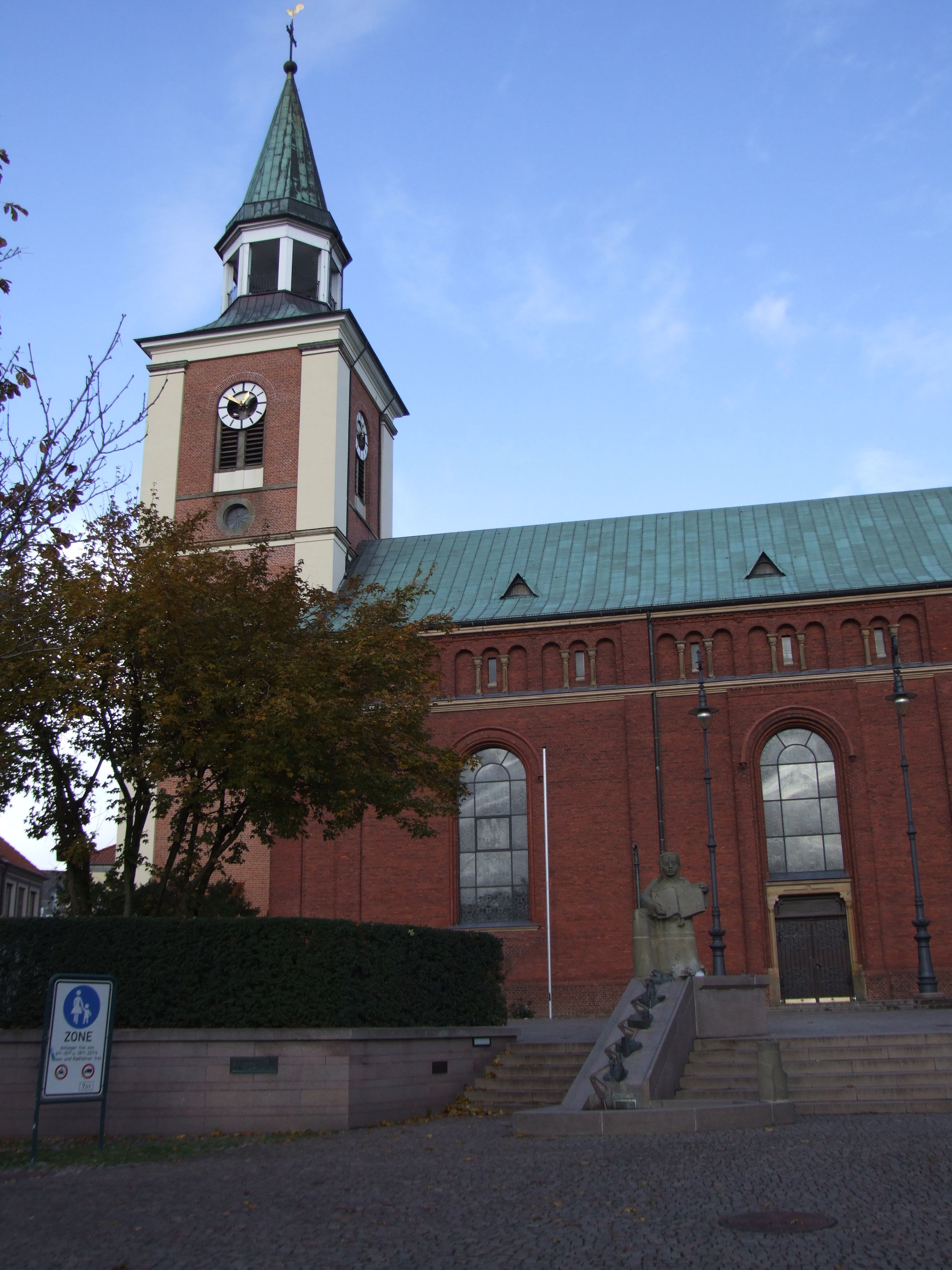 Pfarrkirche St. Gertrud in Lohne